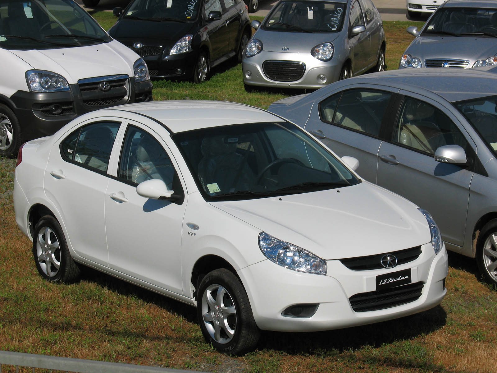 jac137 sedan